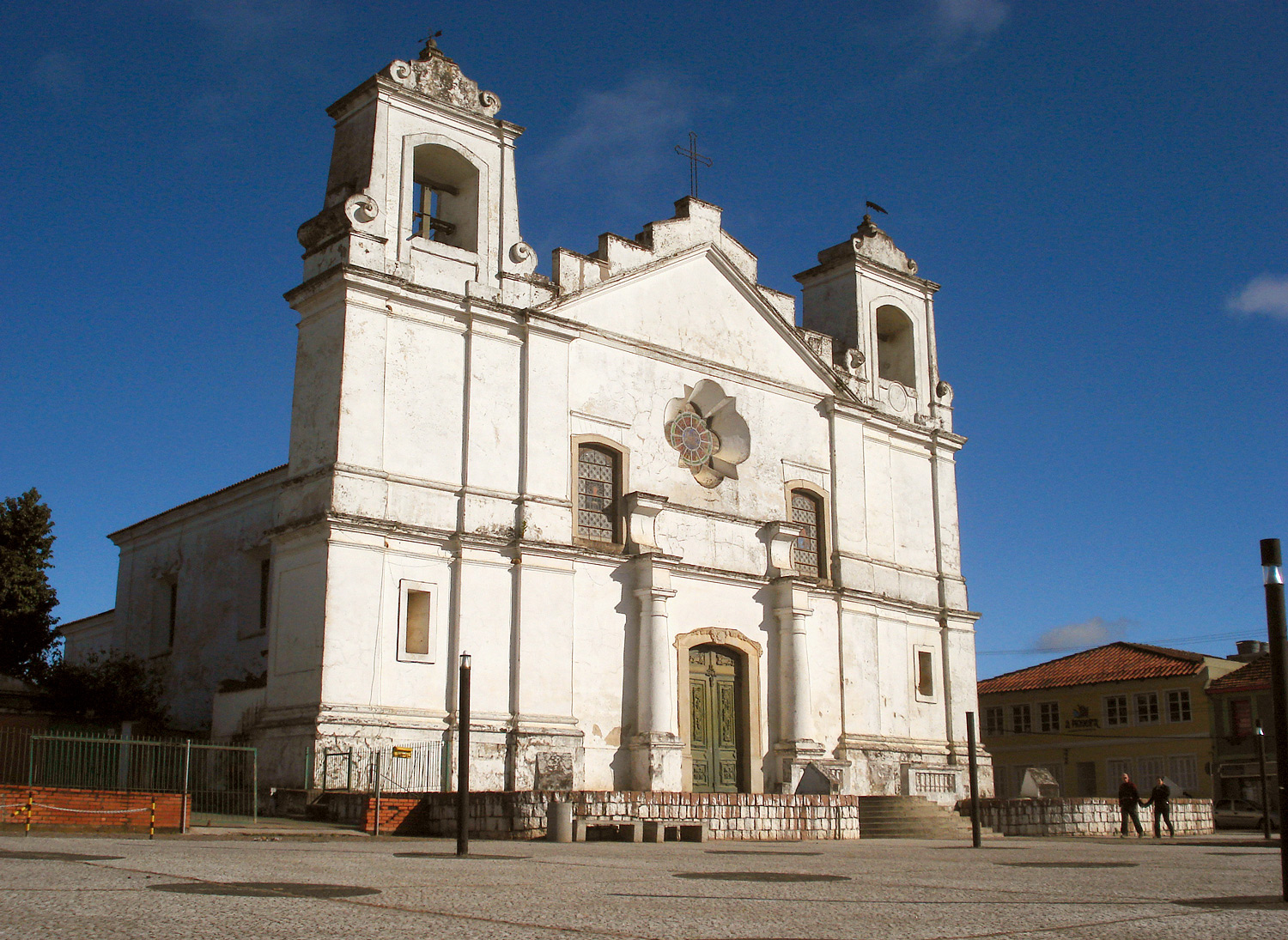 Igreja Matriz de Nossa Senhora da Conceição, Viamão, Brasil.